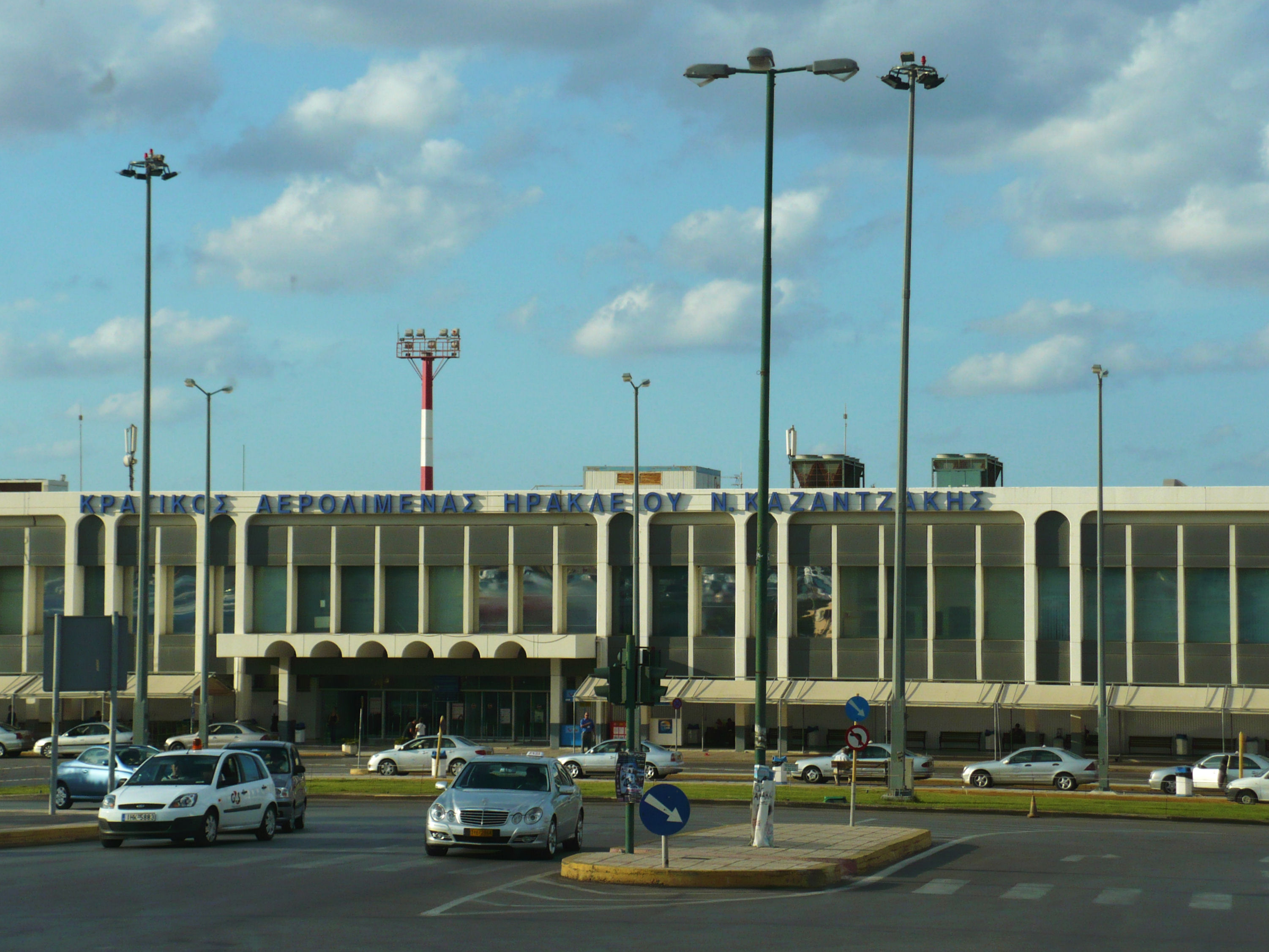 Heraklion,port lotniczy